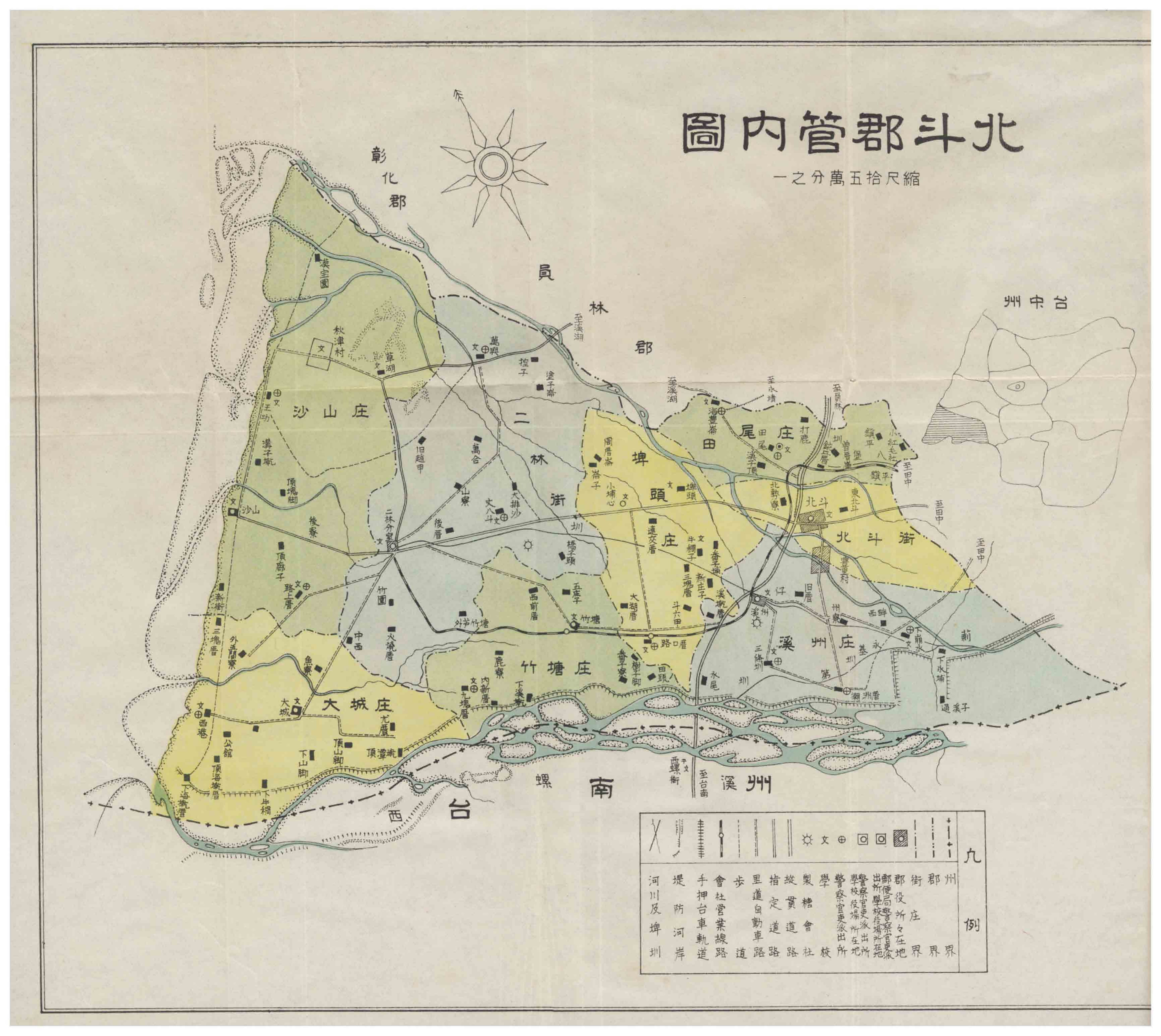 北斗郡為台灣日治時期台中州下的行政區